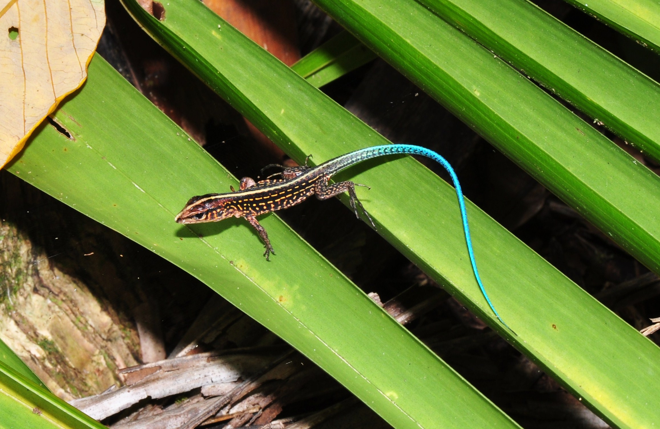 Central American Ameiva juvenile (Ameiva festiva)